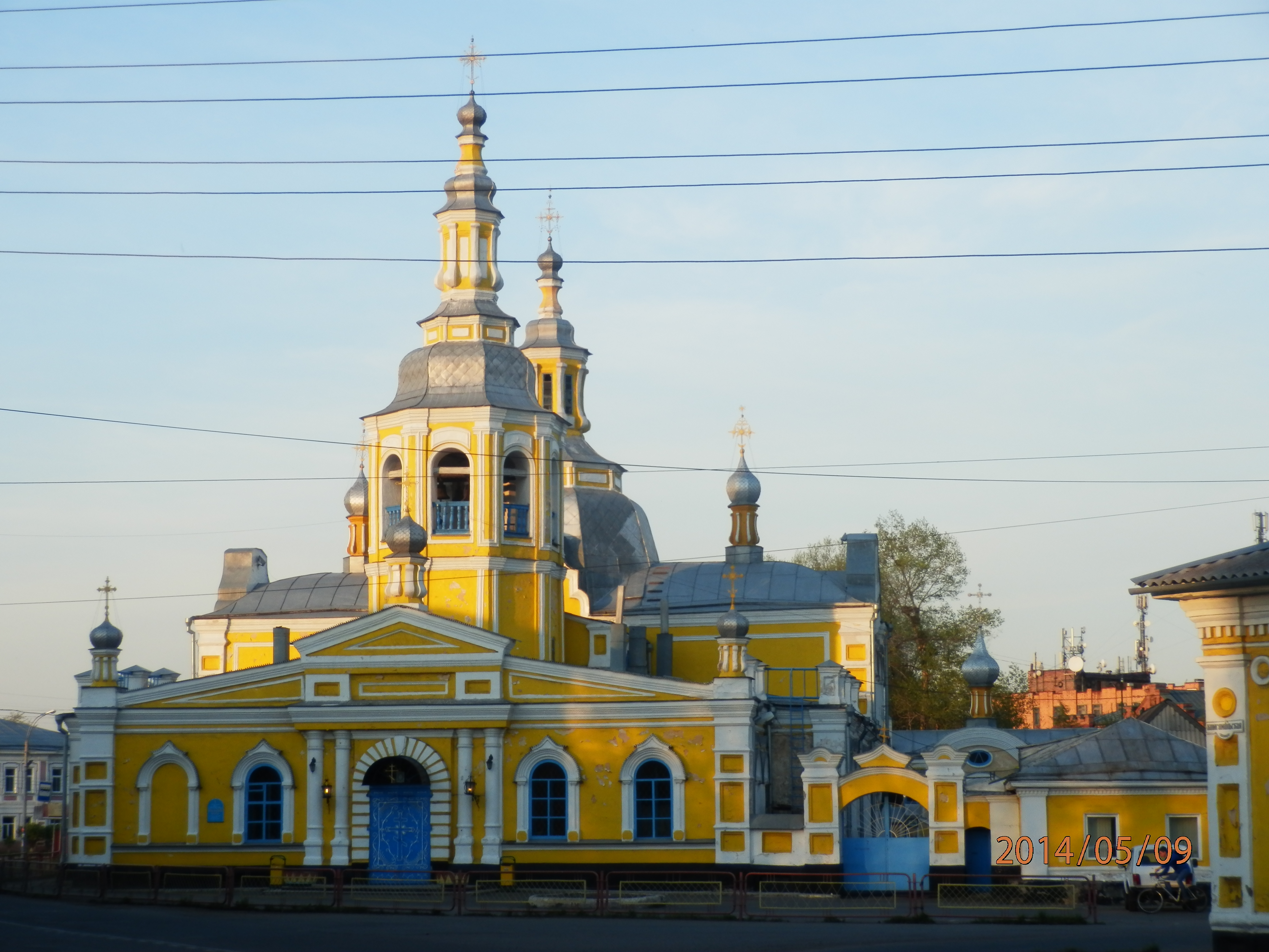 Спасский Собор